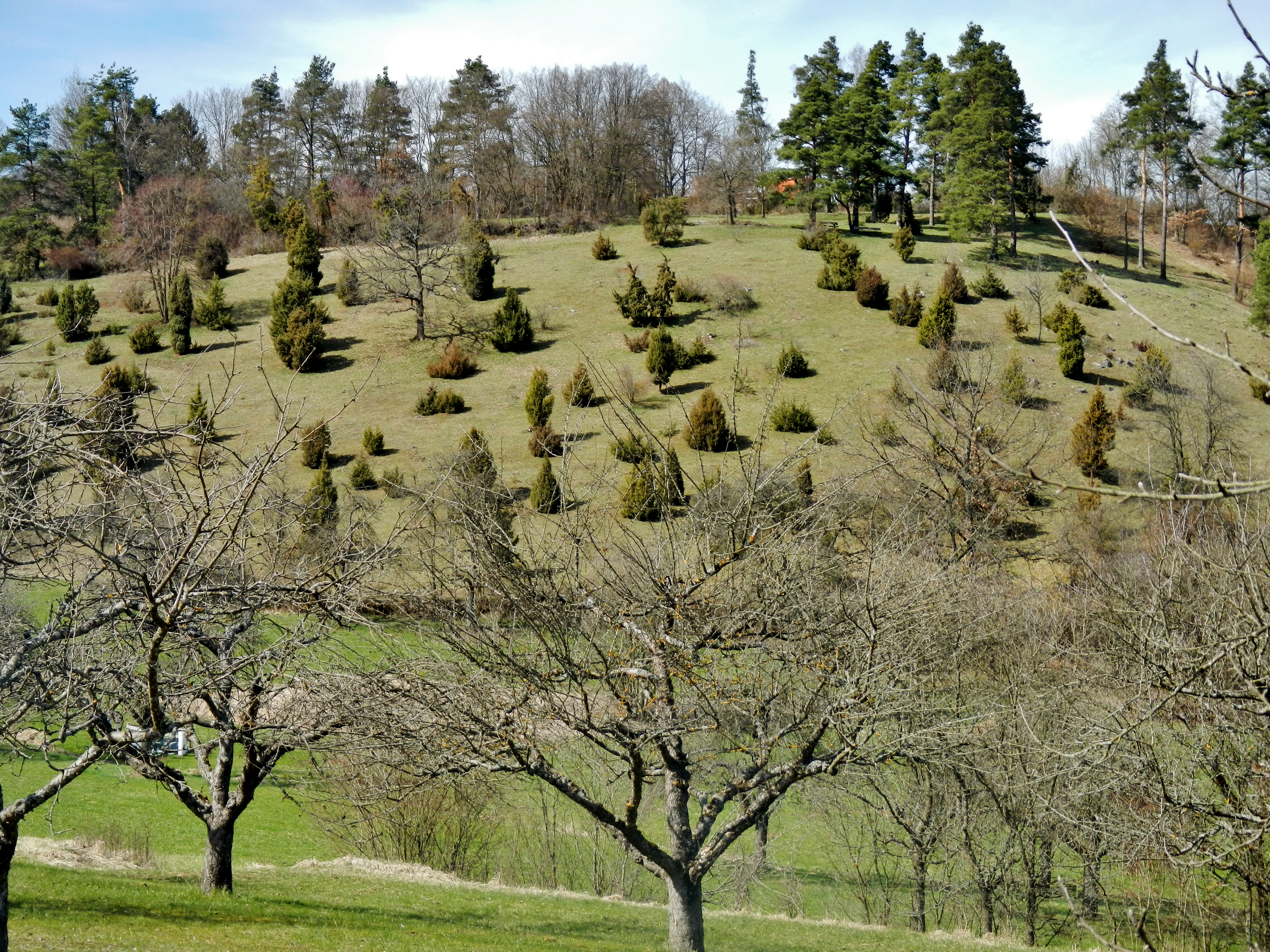 Wachholderheide bei Lehenweiler im Landschaftsschutzgebiet „Aidlingen“ (LSG 1.15.091)